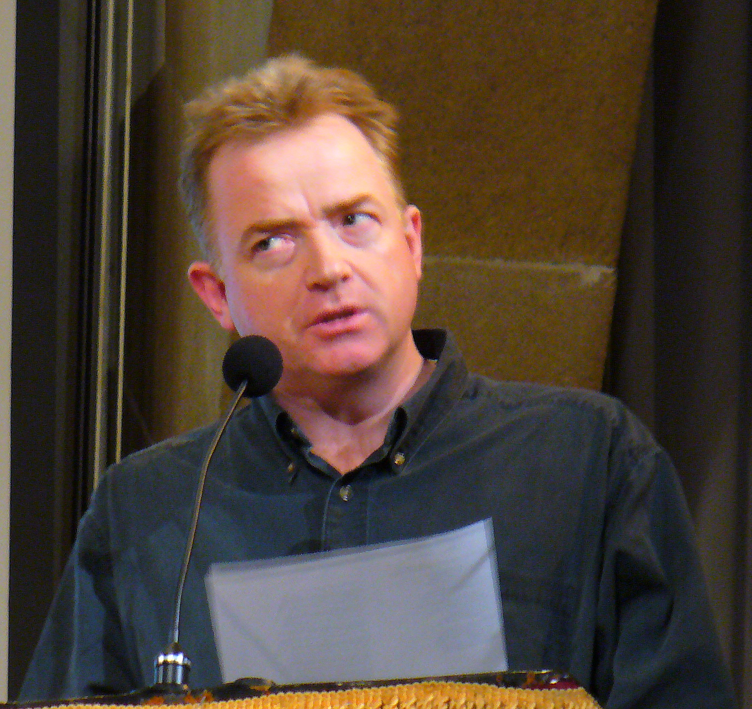 Glyn Maxwell by David Shankbone